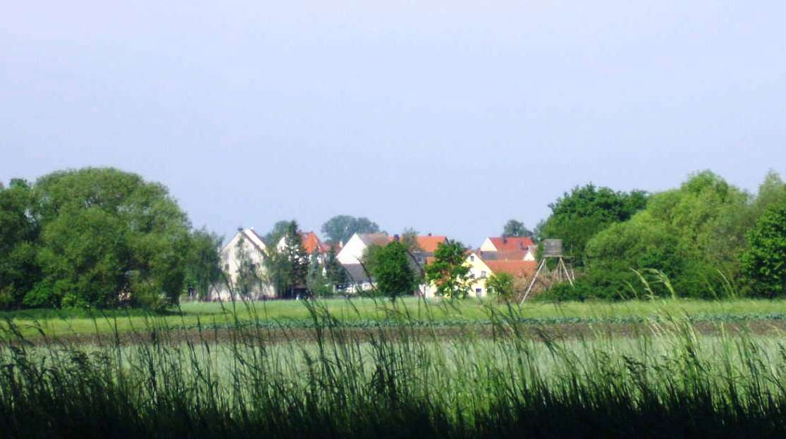 Heglau, Ortsteil von Merkendorf (Mittelfranken)